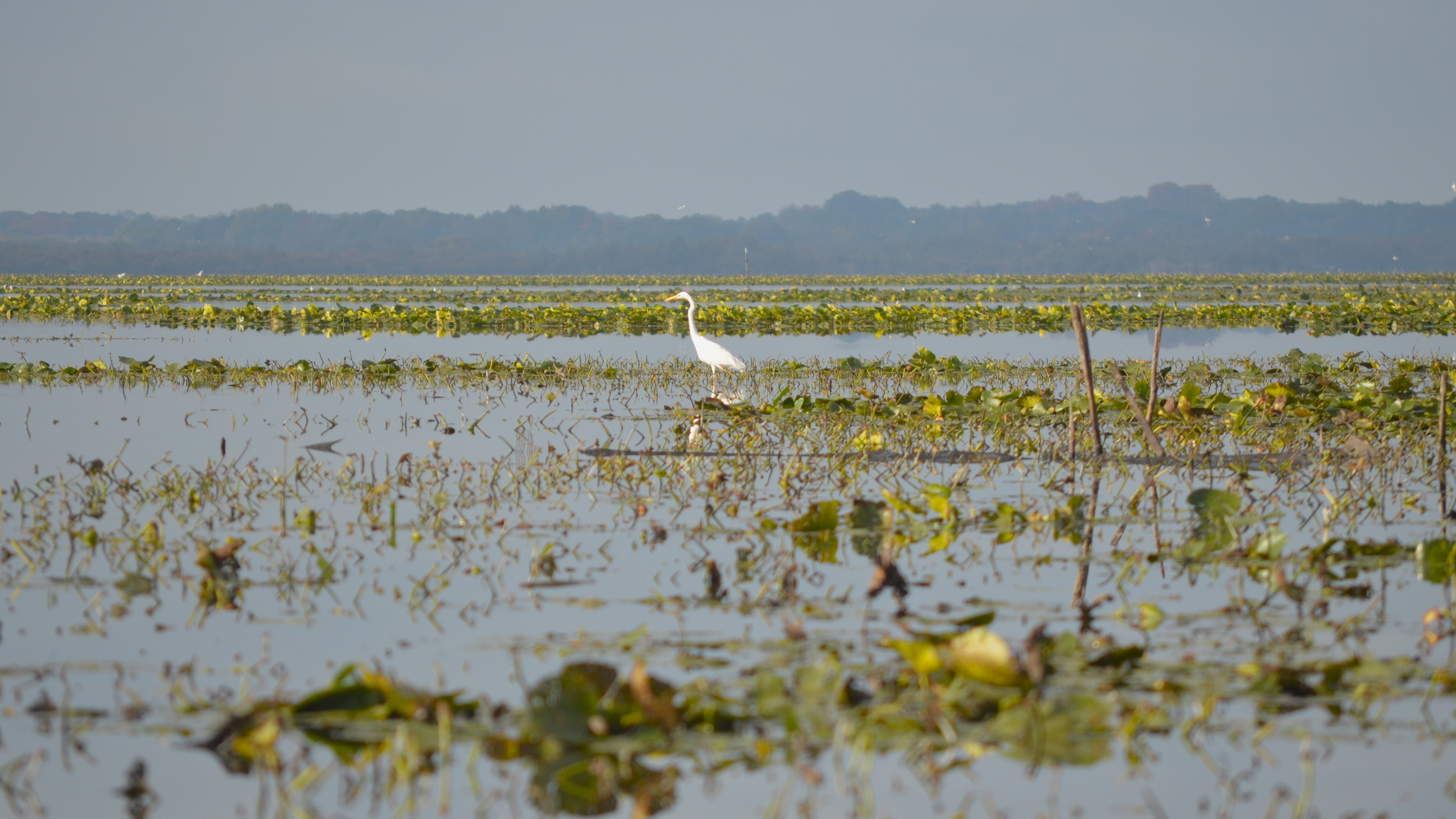 Lac de Grand-Lieu, site de Pierre aiguë - Saint-Aignan-de-Grand-Lieu (Loire-Atlantique)